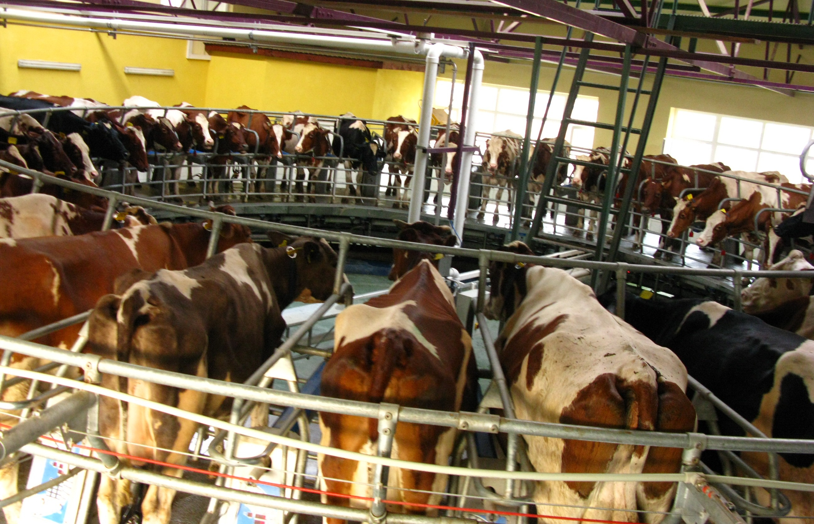 Доильная карусель частного сельскохозяйственно предприятия "Плешкани". Плешкани, Черкасская область, Украина